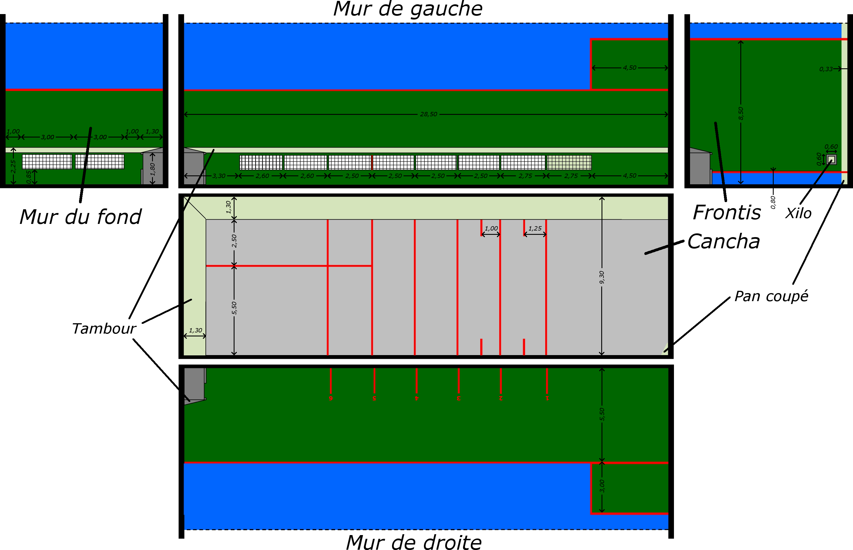 Plan FFPB